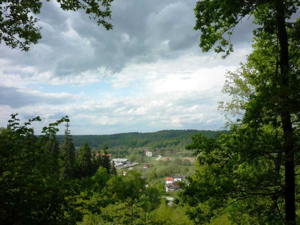 Widok na wzgórze Jaglarz i Płakowice ze Skałki